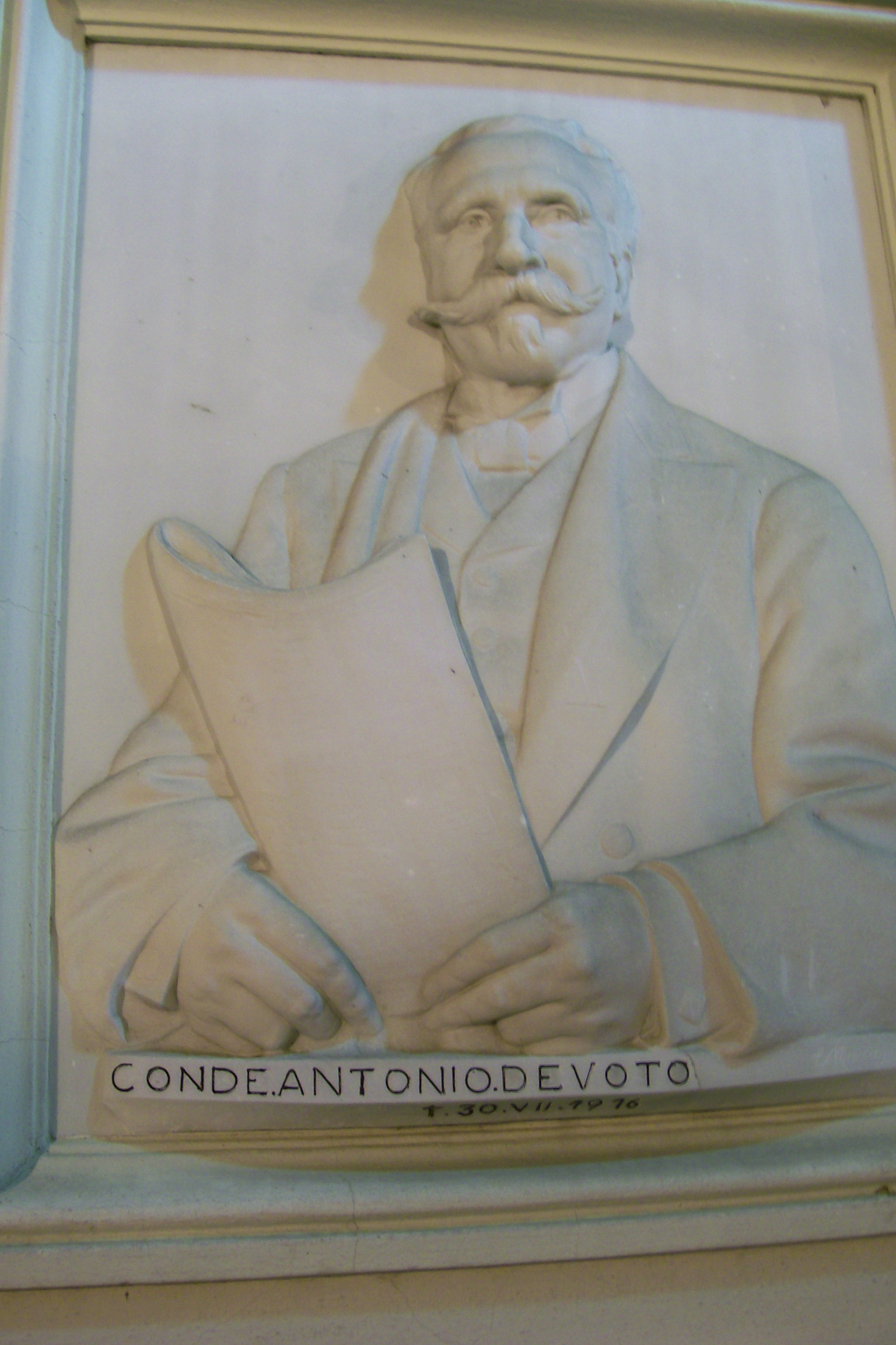 relieve de Antonio Devoto, en la basilica san antonio de padua, villa devoto, buenos aires